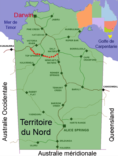 Tracé de la Buchanan Highway dans le Territoire du Nord en Australie